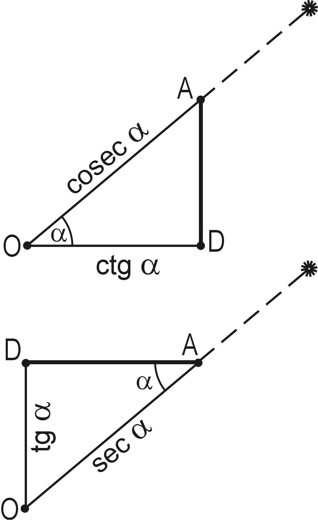 Окружность для определения древних тригонометрических функций